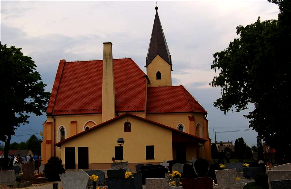 Kościół Matki Bożej Bolesnej w Przysieczy